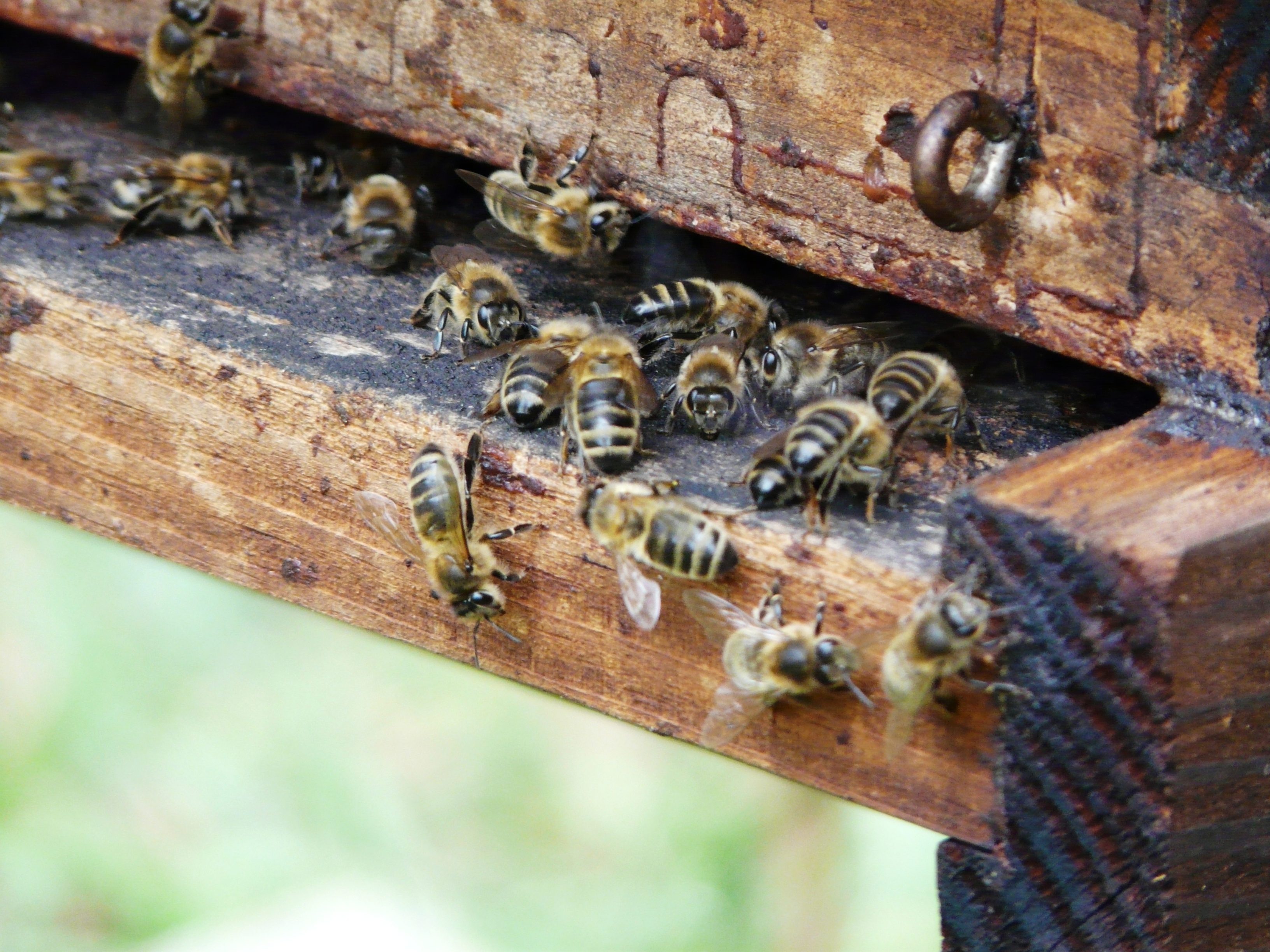 Entrée de ruche